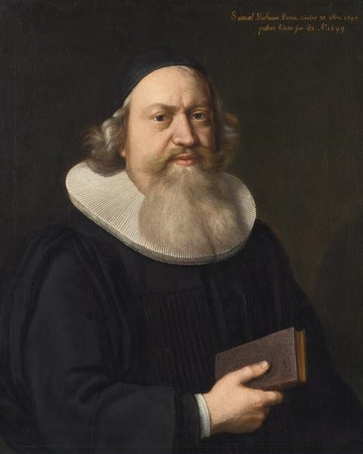 Bildnis Samuel Bachmann